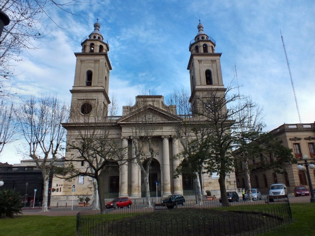 Catedral de San José de Mayo, San José, Uruguay.